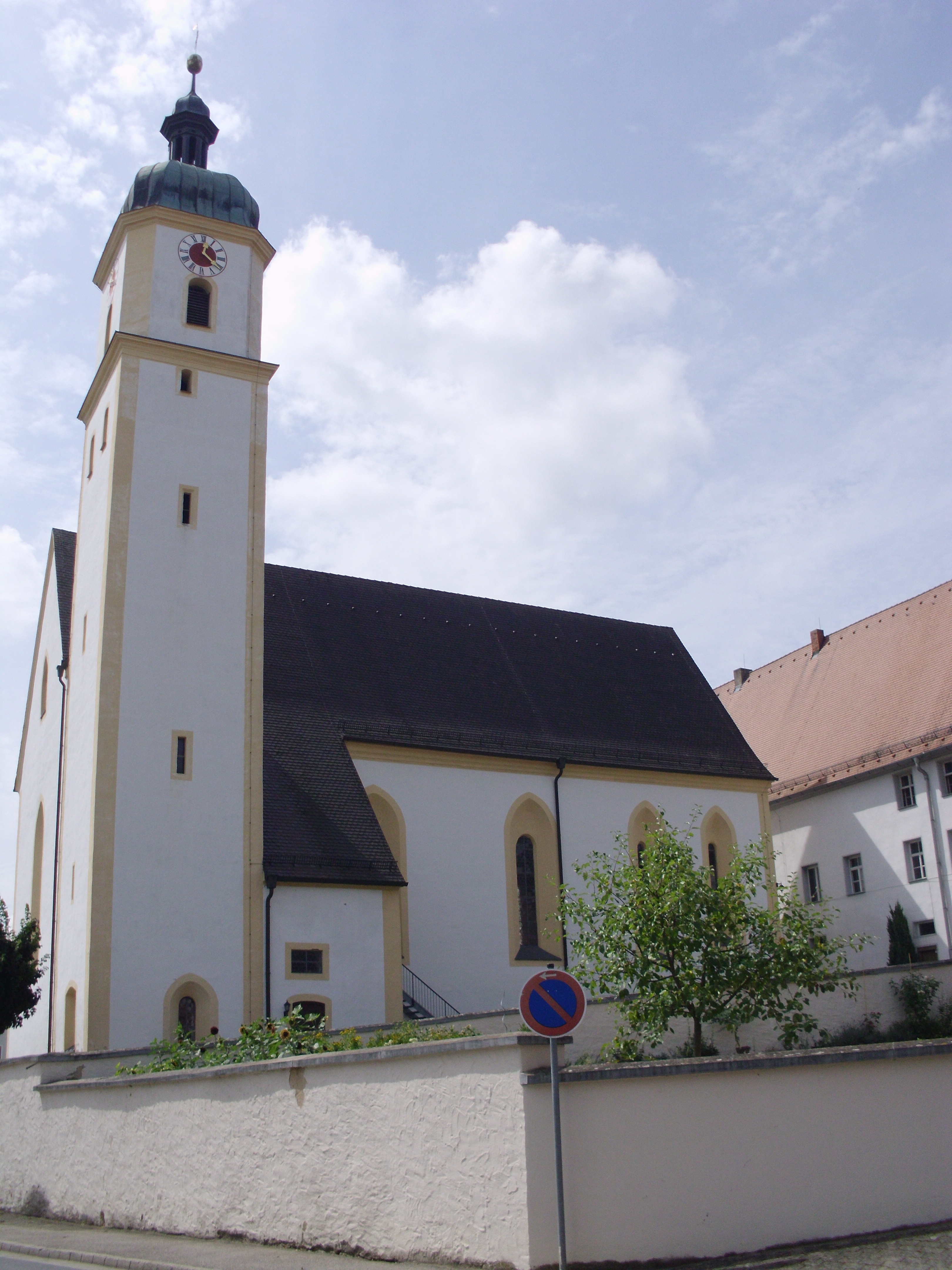 Obermässing, Gemeindeteil von Greding im mittelfränkischen Landkreis Roth, Katholische Pfarrkirche "Mariä Himmelfahrt"